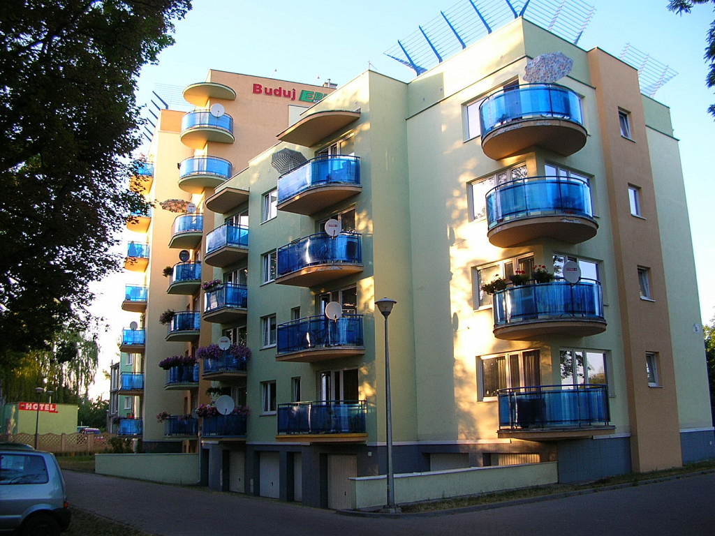 Zabudowa mieszkaniowa na Czyżkówku w Bydgoszczy